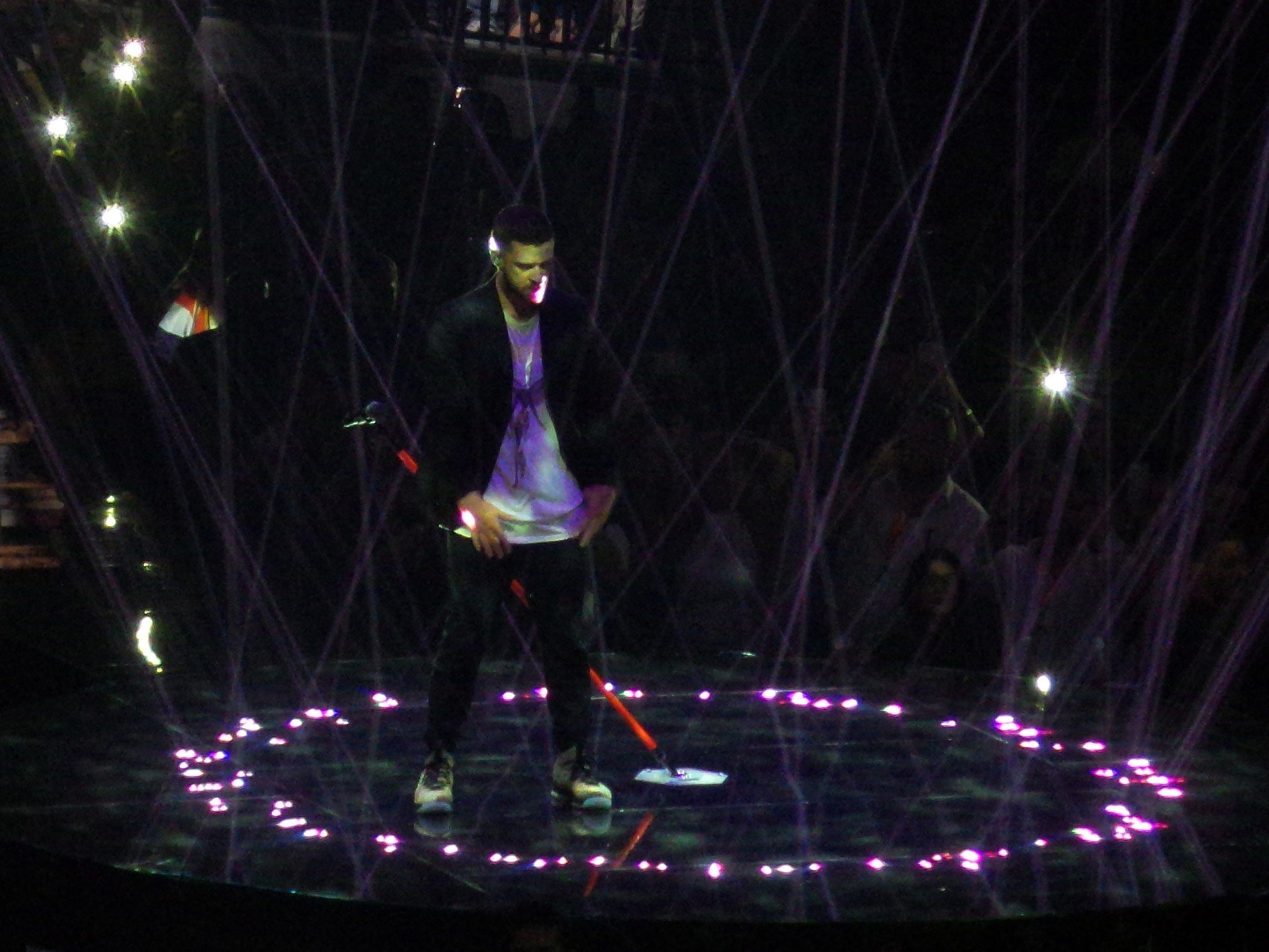 Justin Timberlake en un concierto de su gira Man of the Woods Tour en la ciudad de Miami el 18 de mayo de 2018.